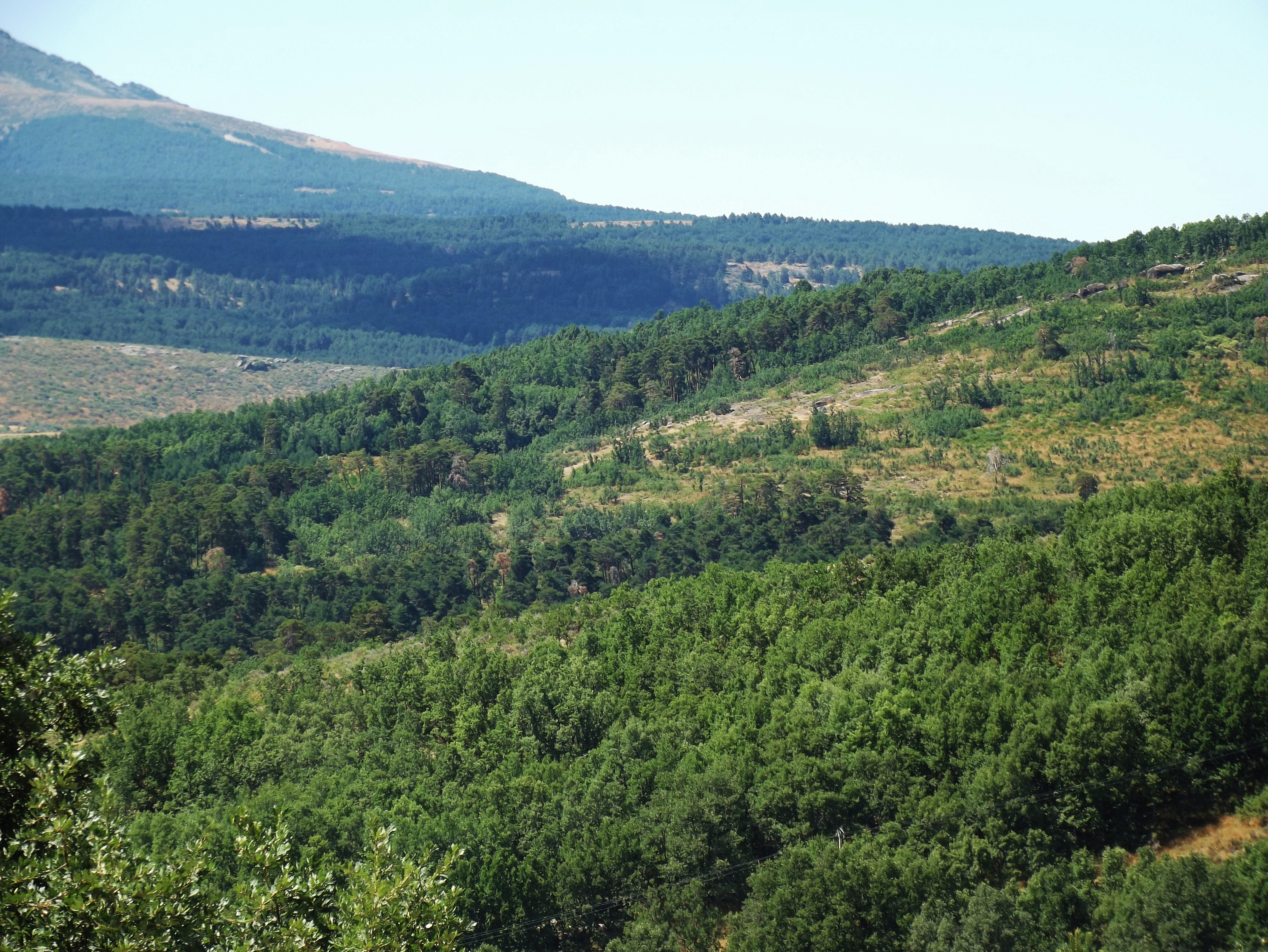 Vista al Suroeste desde Hoyocasero